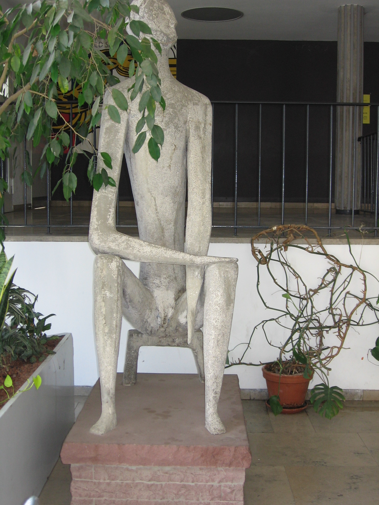 Der 'Große Sitzende' von Helmut Brinckmann in der Cafeteria im B-Bau Obergeschoss, Ludwig-Georgs-Gymnasium, Darmstadt